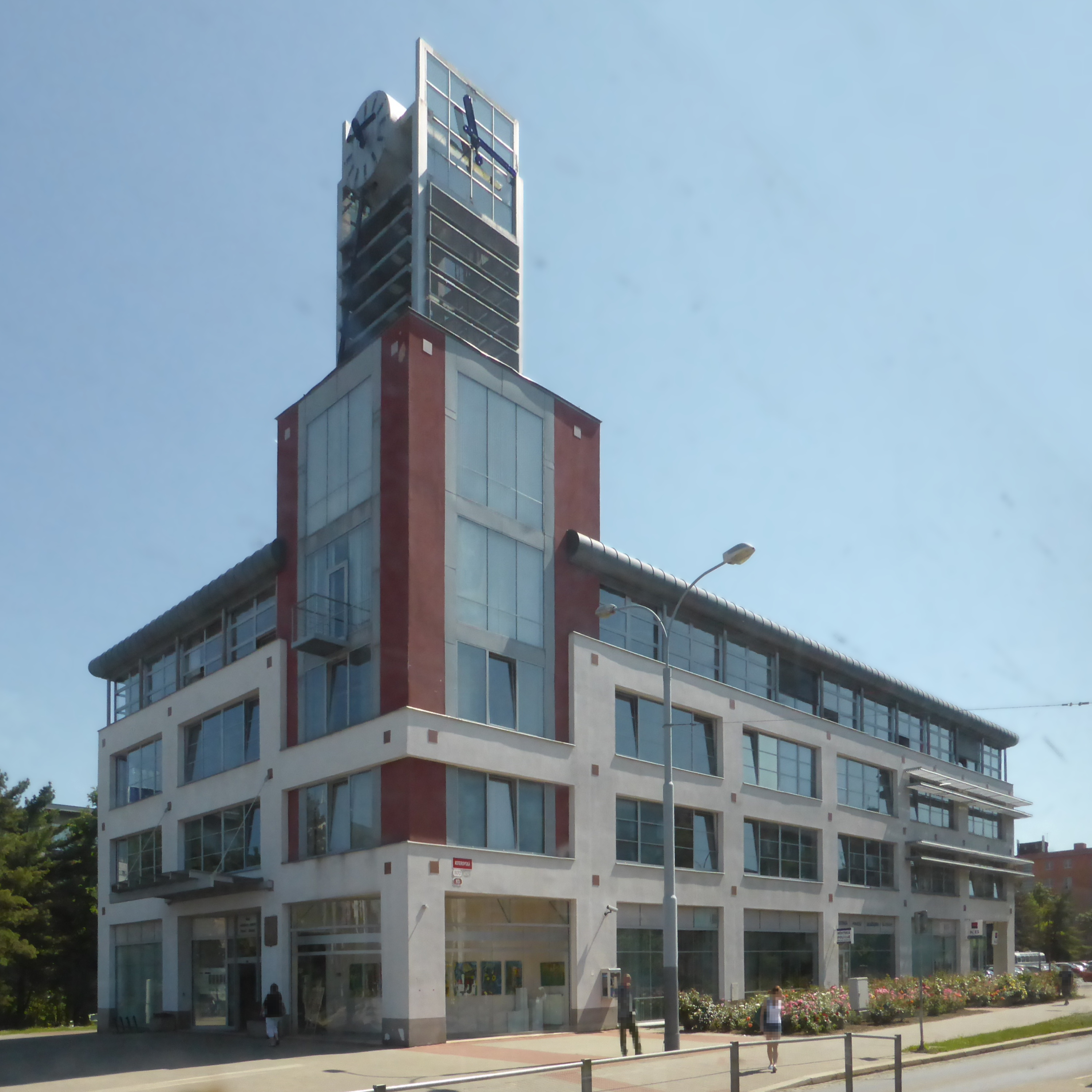 Plzeň, Radnice Slovany (Plzeň 2), Koterovská 1172/83, Plzeň 2, Lobzy.